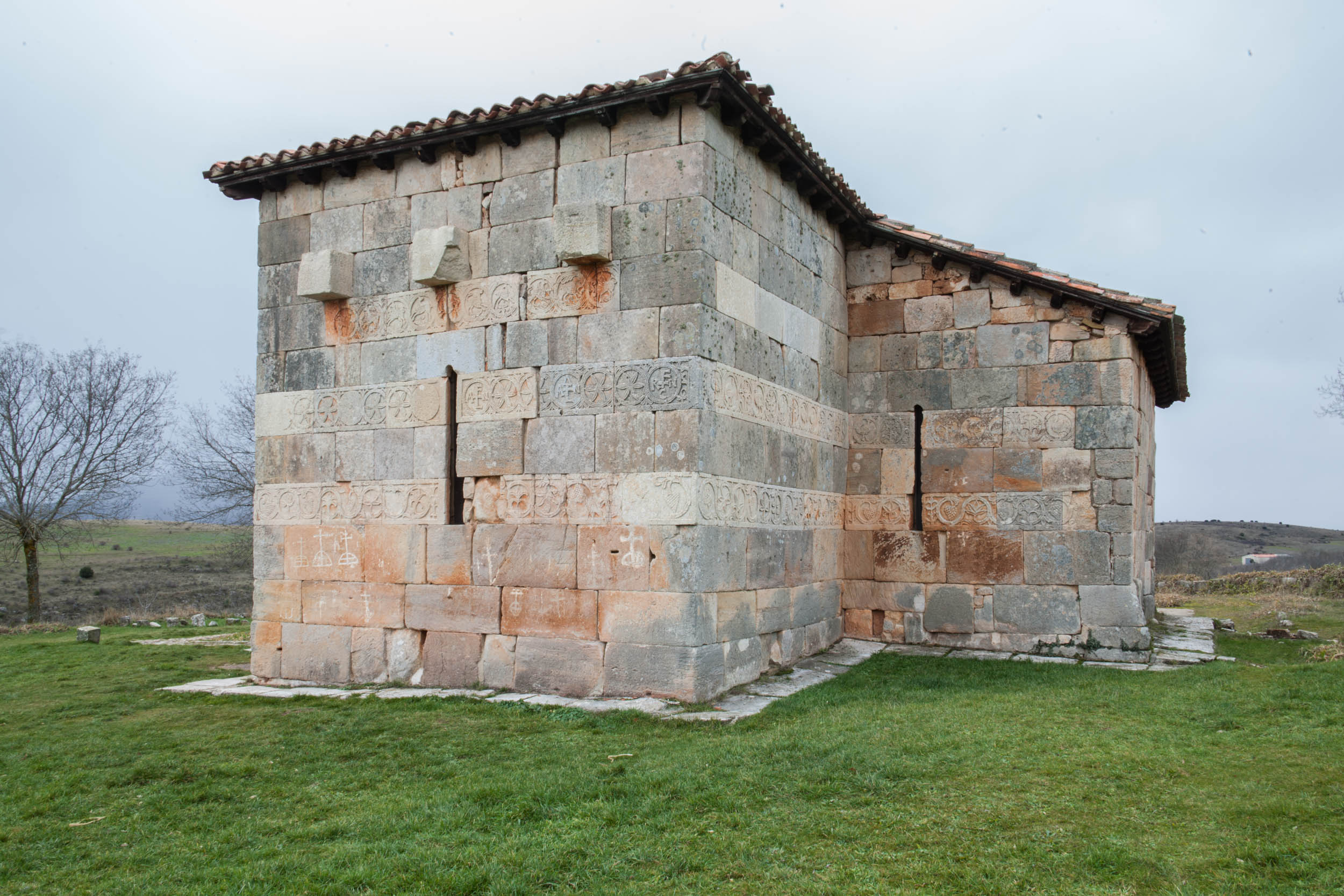 Santa María. Quintanilla de las Viñas. Ábside y crucero norte